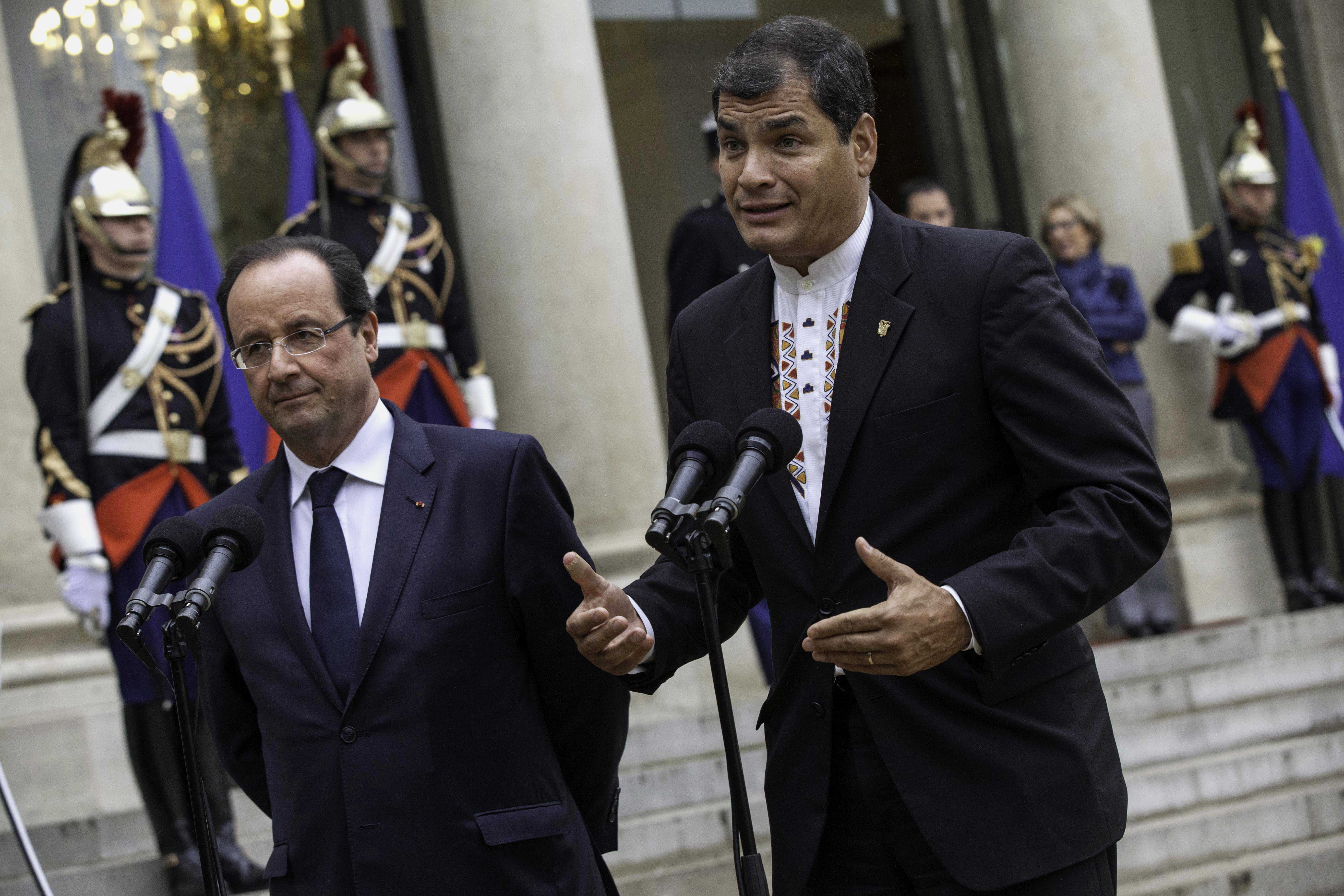 Paris (Francia), 07 de noviembre 2013. El Presidente Rafael Correa fue recibido por su homólogo de Francia, Francois Hollande, en el Palacio del Elíseo. Foto: Fernanda LeMarie - Cancillería del Ecuador.